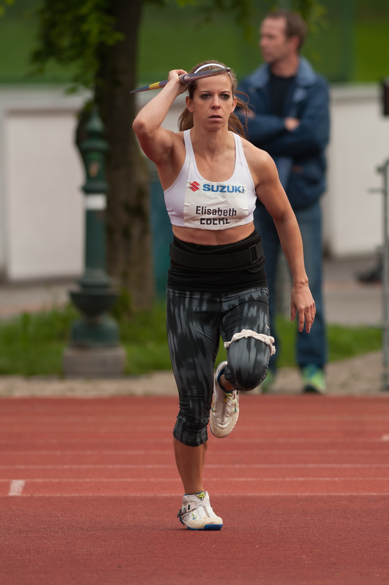 Salzburger Leichtathletik Gala am 27. Mai 2015: Elisabeth Eberl